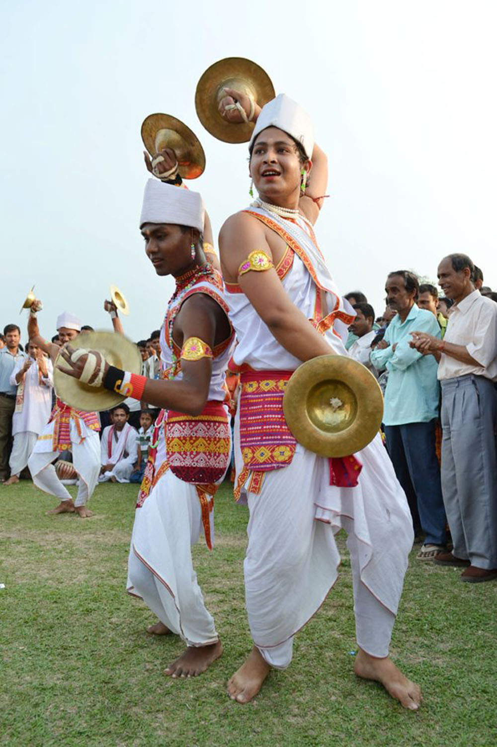 অসমীয়া: বহাগ মাহত কামৰূপ জিলাৰ বকোত অনুষ্ঠিত হোৱা সুঁৱৰী উৎসৱৰ ২৩-০৪০২০১২ ইং তাৰিখে হোৱা সামৰণি অনুষ্ঠানত অংশ গ্ৰহণ কৰা বকো ভালুকঘাটাৰ সত্ৰীয়া দলৰ সত্ৰীয়া ভোৰতাল নৃত্যৰ এক দৃশাংশ।